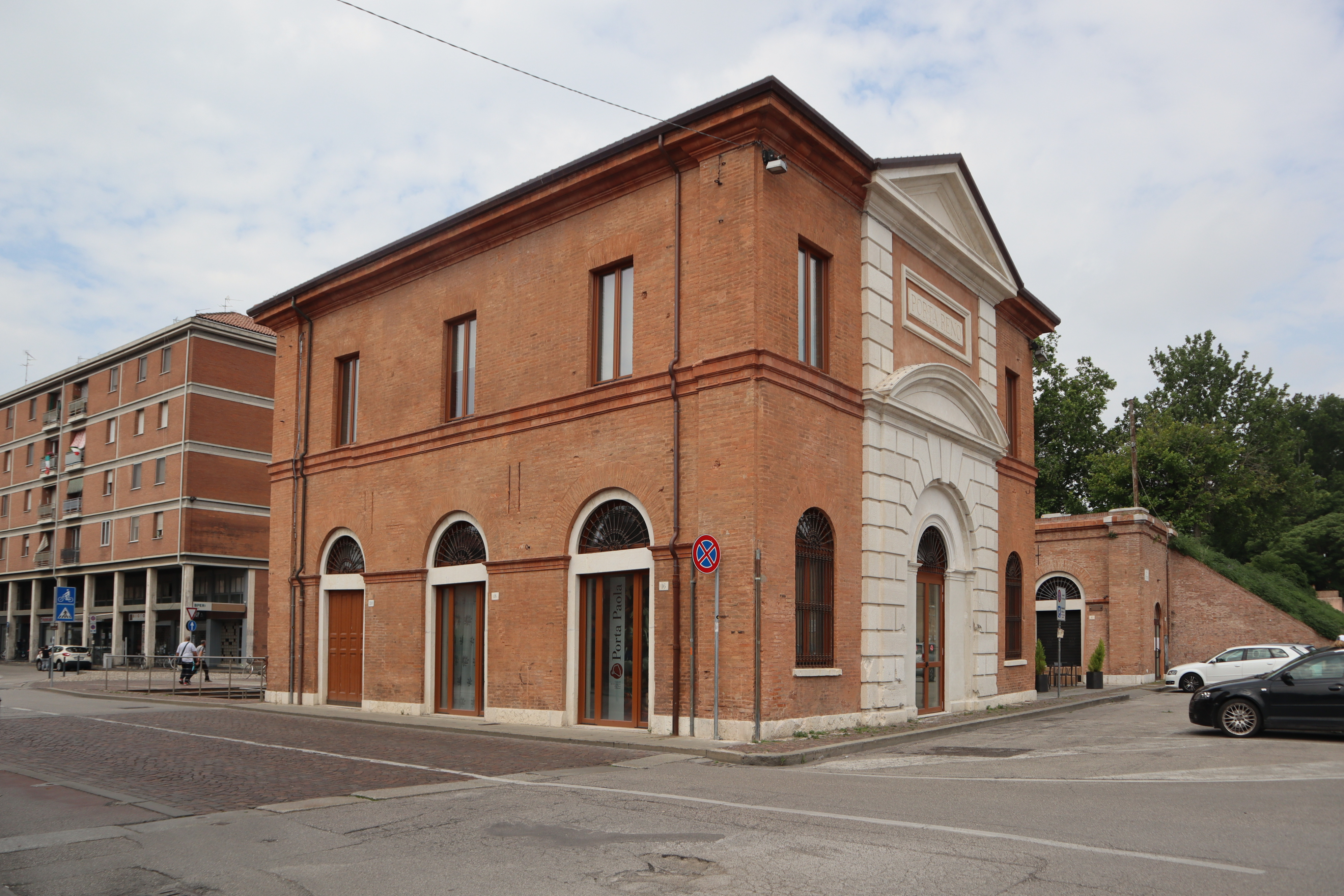 Porta Paola a Ferrara. Prospetto est.